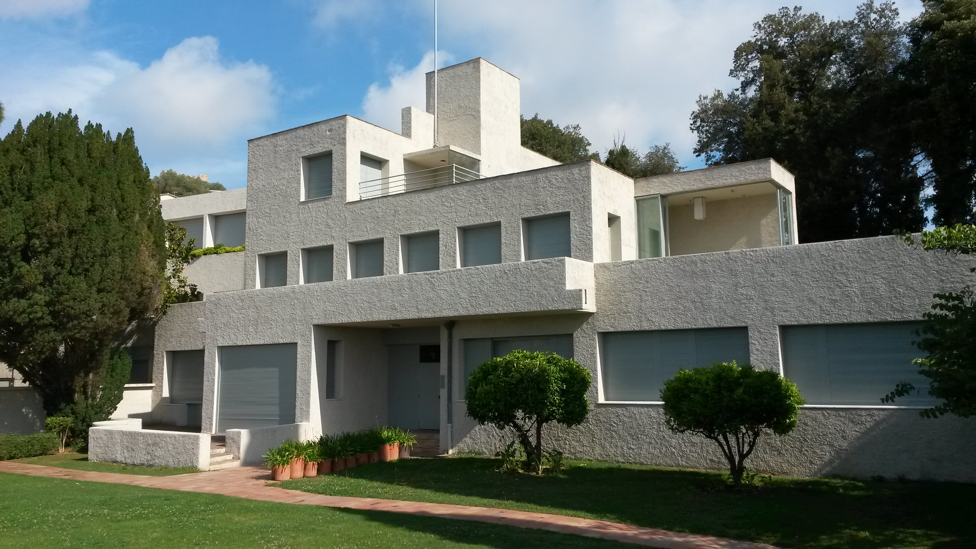 Südfront mit Sicht auf Hyères